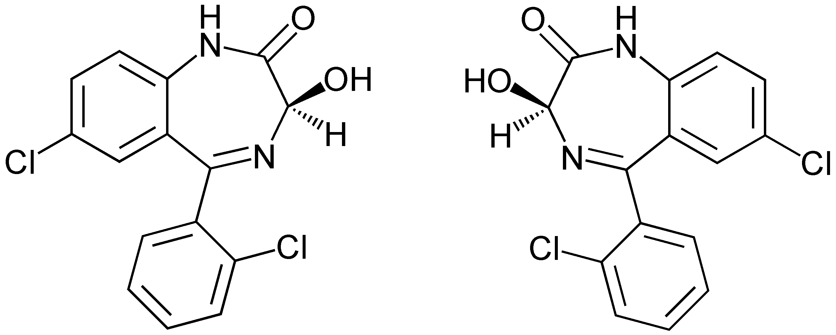 Strukturformeln der beiden Enantiomeren von Lorazepam